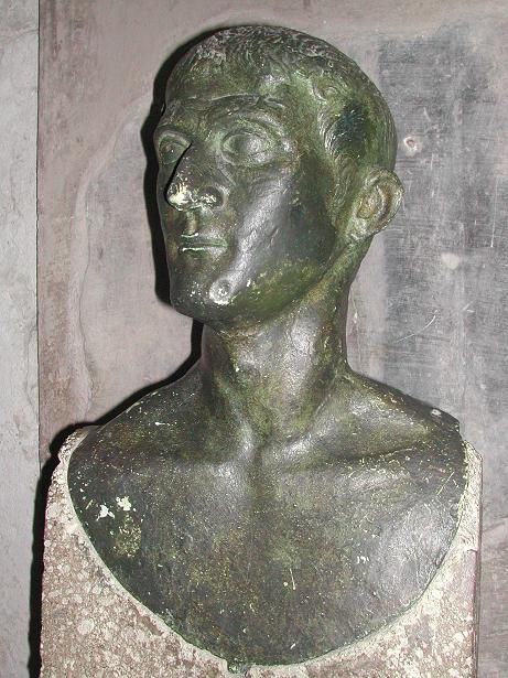 L'Erma di bronzo nella omonima casa